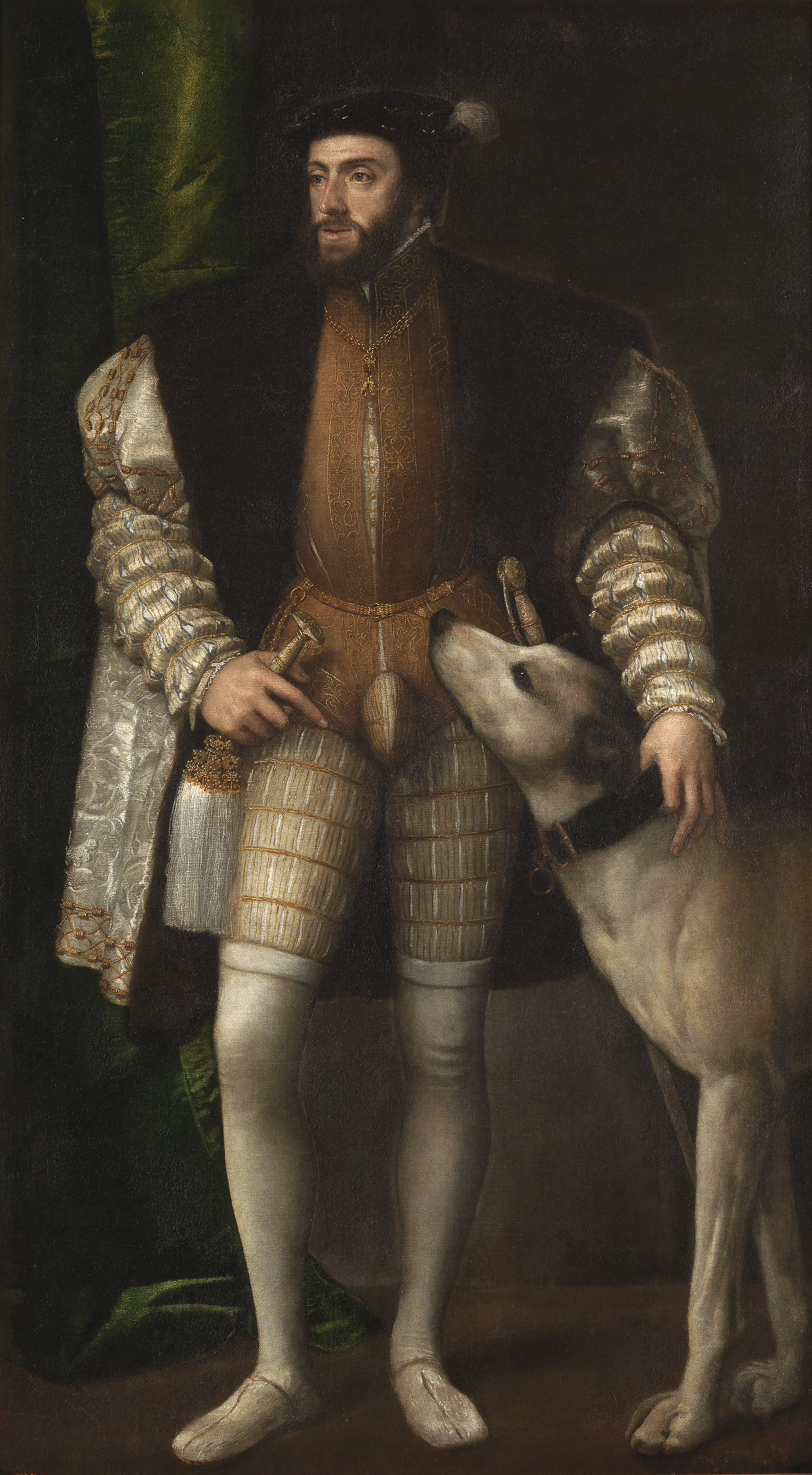 Retrato del emperador Carlos I de España (1500-1558), que aparece representado de cuerpo entero y junto a un perro.